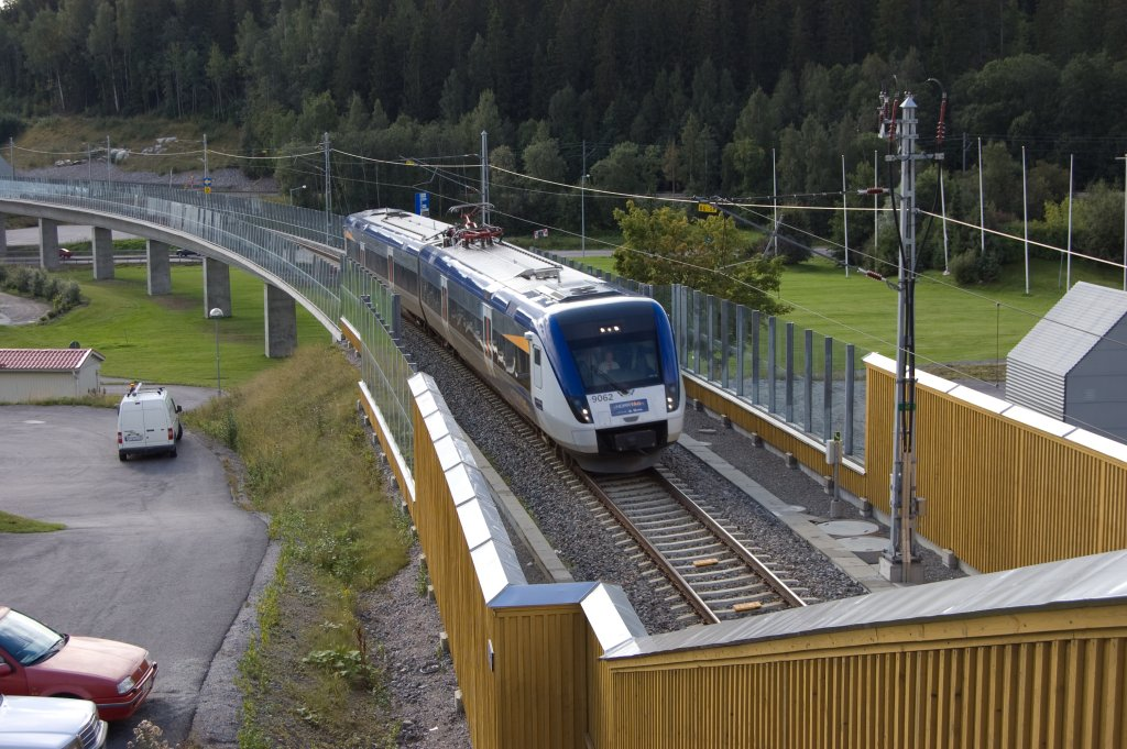 Botniabanan: Bridge in Örnsköldsvik